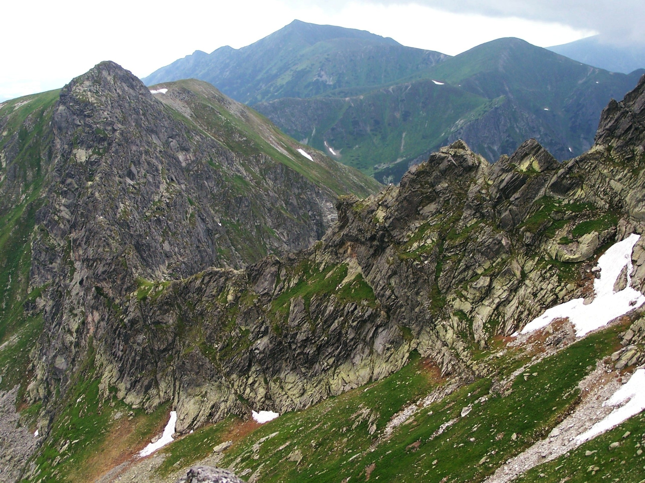 Walentkowy Wierch (High Tatras)